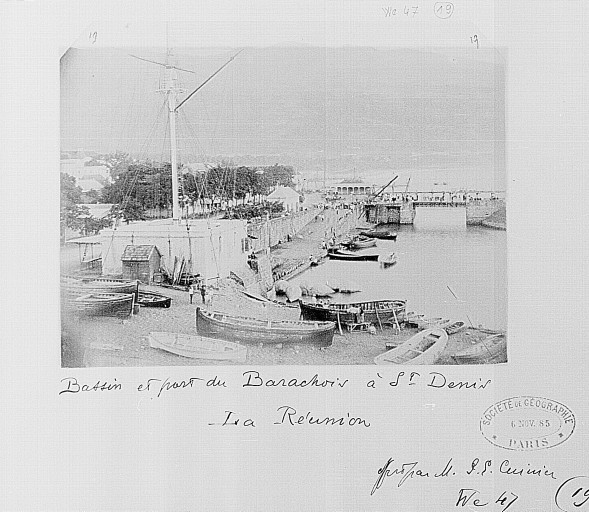 Le bassin et le port du Barachois de Saint-Denis avant 1885.